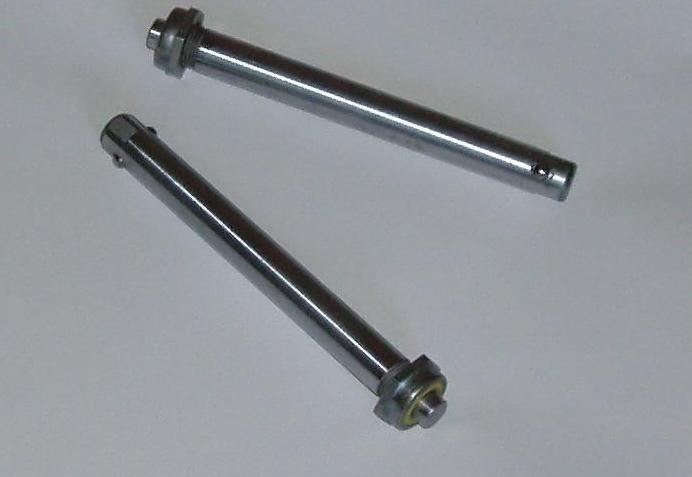 Steckachsen